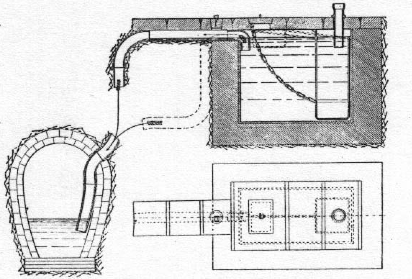 The invention of the septic tank: Fosse mouras from 1860.